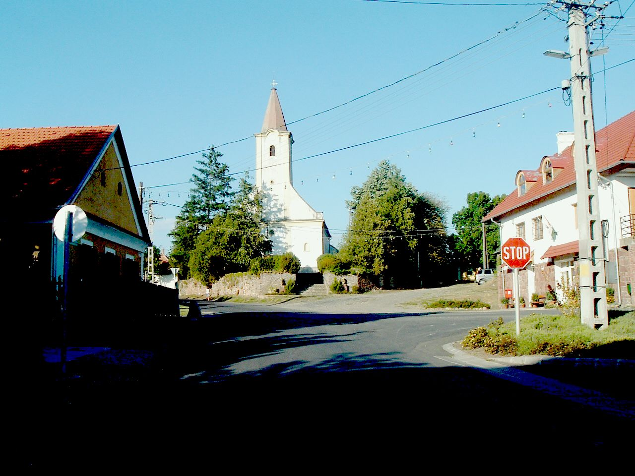 The Roman Catholic Church in Káptalantóti. Szent Márton püspök római katolikus templom